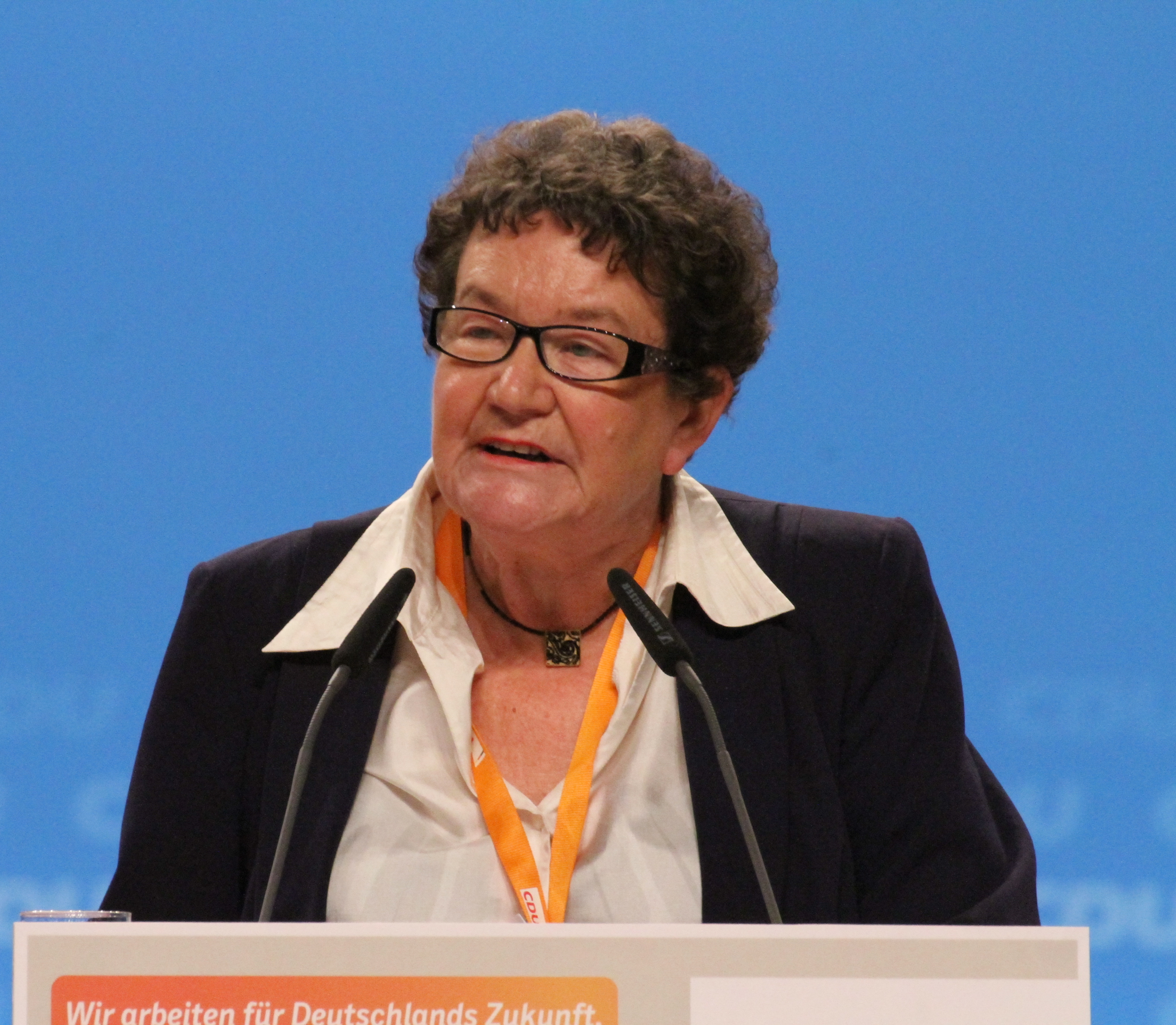 Dagmar Schipanski auf dem CDU Bundesparteitag Dezember 2014 in Köln